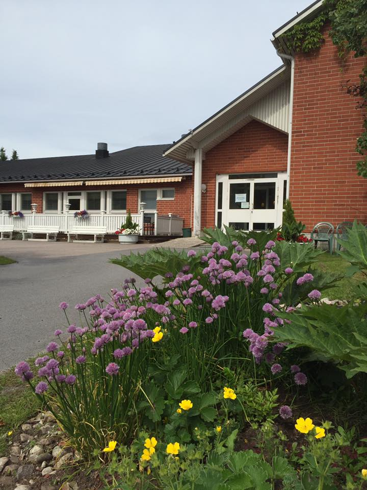 Kalajoen Kristillisen Opiston päärakennus